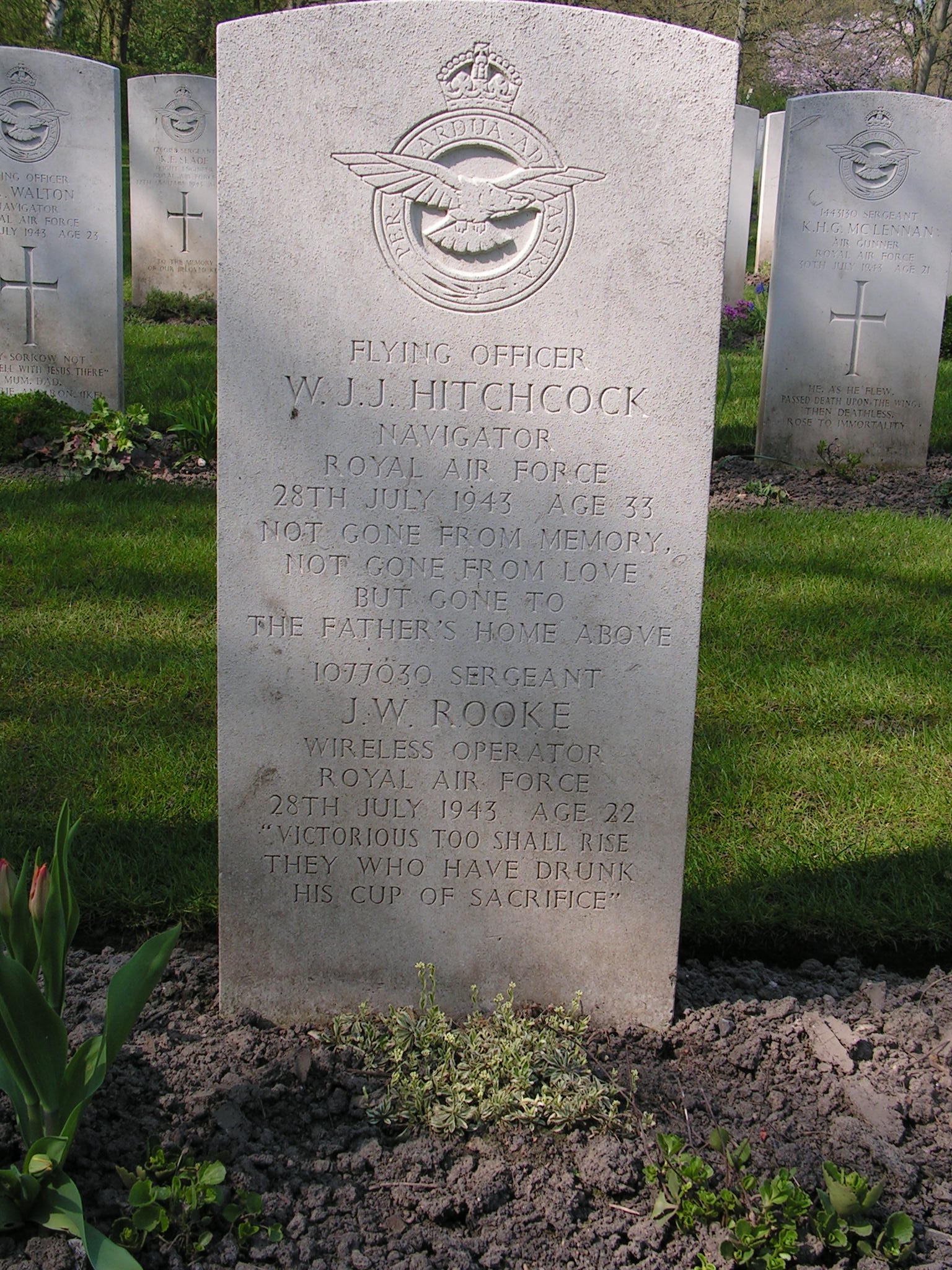 Kiel War Cemetery/Beispiel für Grabsteingestaltung